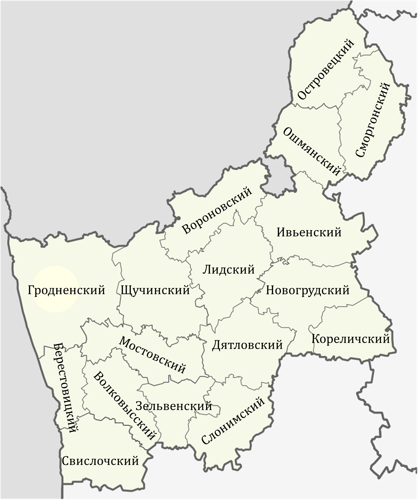 Административно-территориальное деление Гродненской области